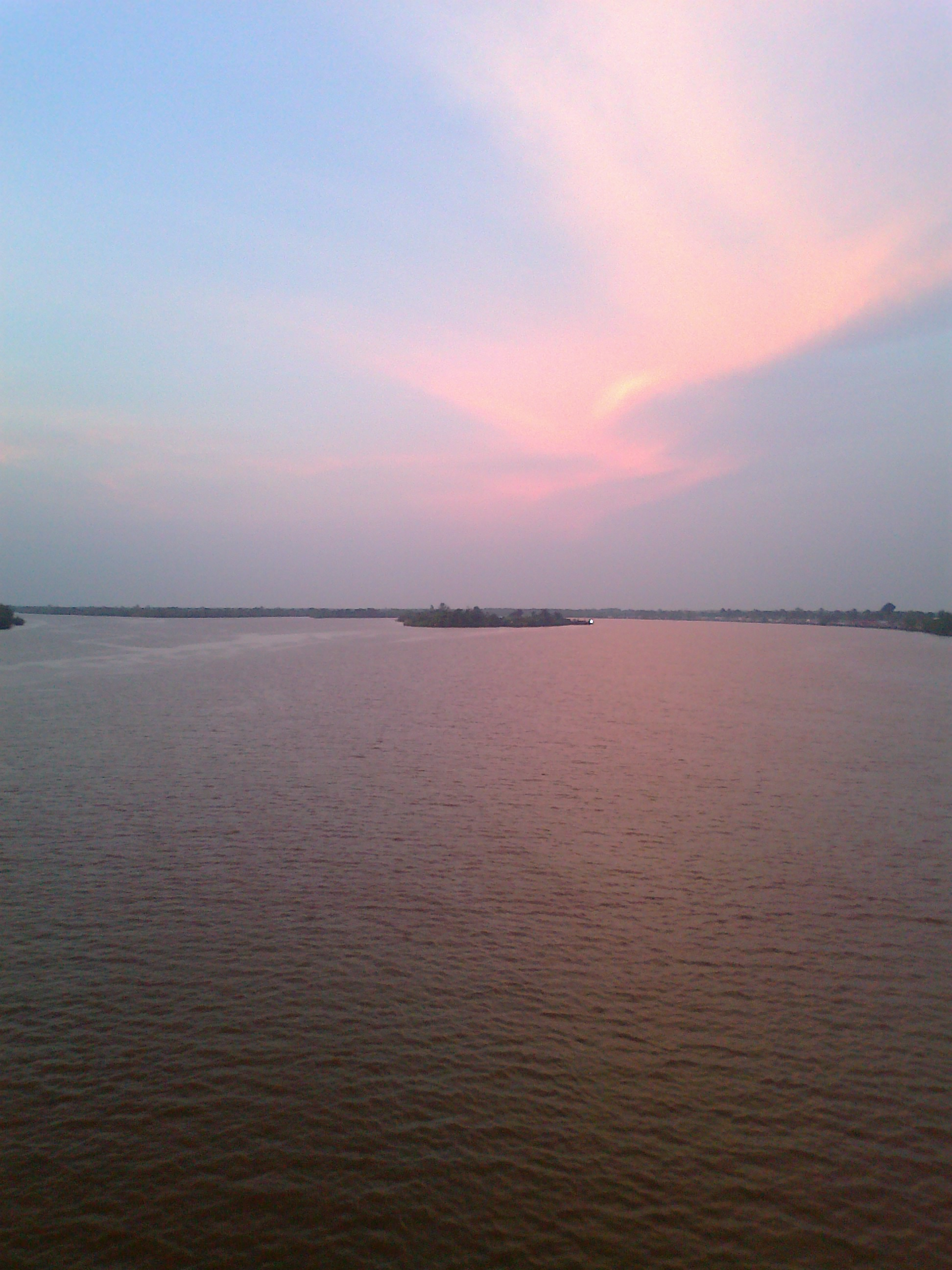 Foto ini diambil dari atas Jembatan Pulau Telo, tepat kearah tiga pulau yang berada di tengah-tengah sungai di Kab. Pulang Pisau, Kalimantan Tengah